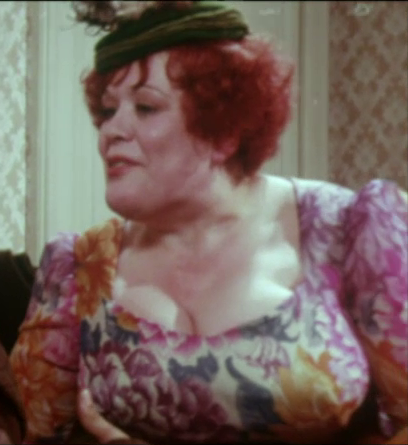 Italian actress Maria Antonietta Beluzzi